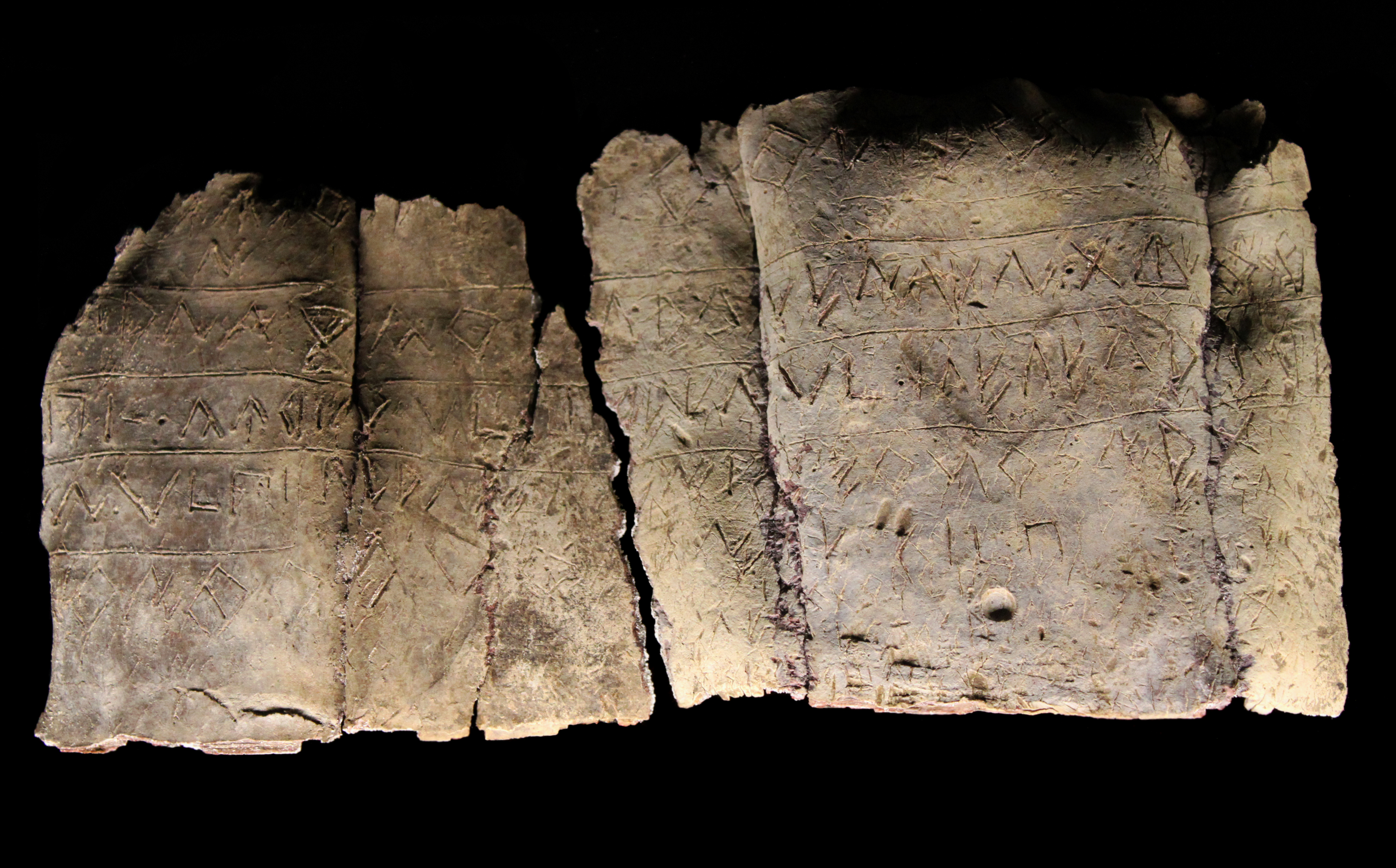 Plomo con inscripción ibera del yacimiento de Pico de los Ajos, Yatova, denominado "Pico de los Ajos I". El plomo mide 200 mm de longitud y 100 mm de anchura. Por la cerámica asociada del yacimiento se ha estimado que pertenecen a finales del siglo II a.C. y principios del siglo I a.C. Se encuentra inscrita por ambas caras comprobándose también la existencia de textos anteriors deficientemente borrados. Se muestra en la imagen la Cara A del plomo con tres textos. [1] Depositada en el Museo de Prehistoria de Valencia, Comunidad valenciana, España.